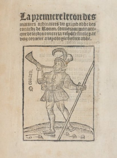 La premiere lecon des matines ordinaires du grand abbe des conardz de Rouen, souuerain monarcque de lordre : contre la response faicte par ung corneur a lapologie dudict abbe. Rouen, 1537. Petit in-4°, 165 x 225 mm. Une réédition a été faite à 18 exemplaires chez Panckoucke à Paris en 1848. Un d'entre eux est conservé à la BNF. Une 2è réédition à été faite à 12 exemplaires de l'imprimerie de P-A Bourdier 30 Rue Mazarine en 1857.pet in-12-15,5 X 9,5 de 11 pages et vign;tiré à 12 exemplaires.Rien à la BNF et dans les Bibliothéque de la Normandie (2è édition tirée à 12 exemplaires en fin de volume)1 REF Frère T1 pages 262